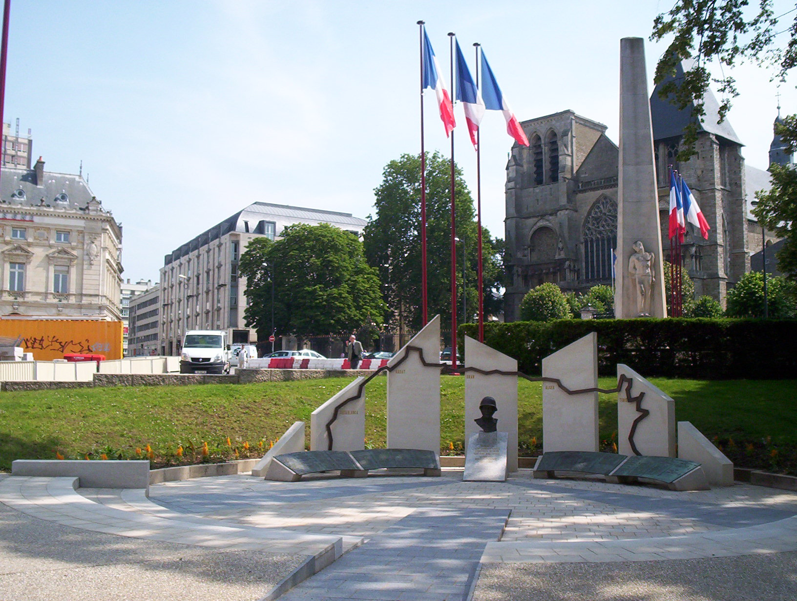 Le monument aux morts pour les manceaux tombés en Algérie